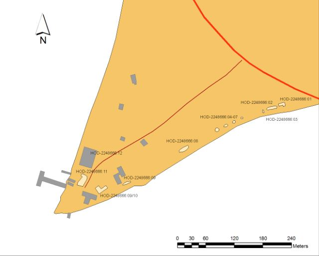 Uppmældar minjar á FramnesI/Höfðaodda